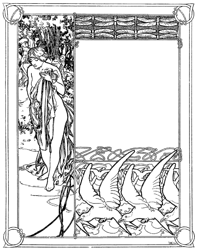 version N&B d'une illustration en couleurs pour Ilsée, editions Piazza et Masson